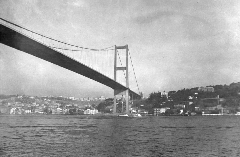 Мост в Стамбуле, азиатская часть